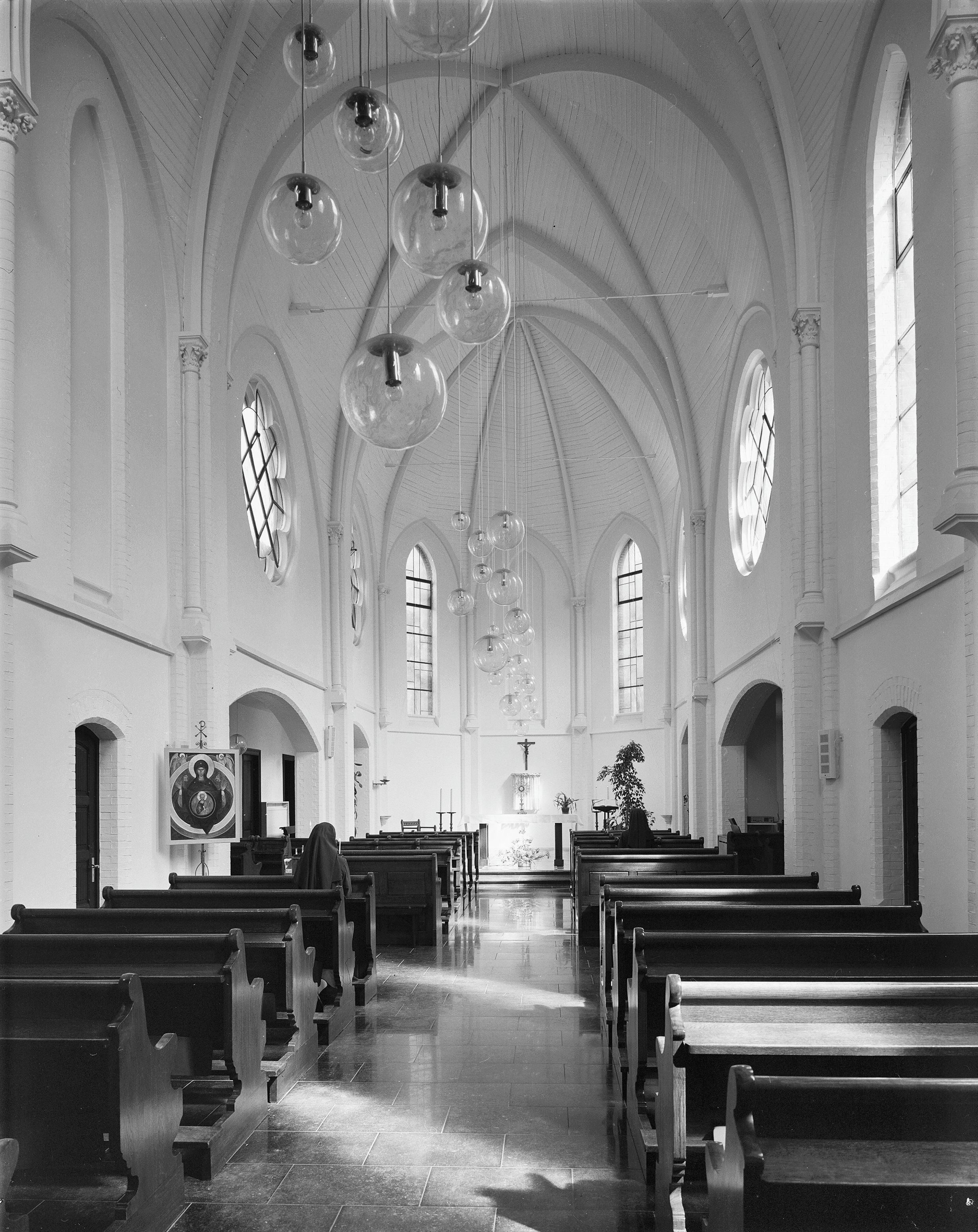 Klooster Van De Zusters Reperatricen: interieur kapel naar het oosten